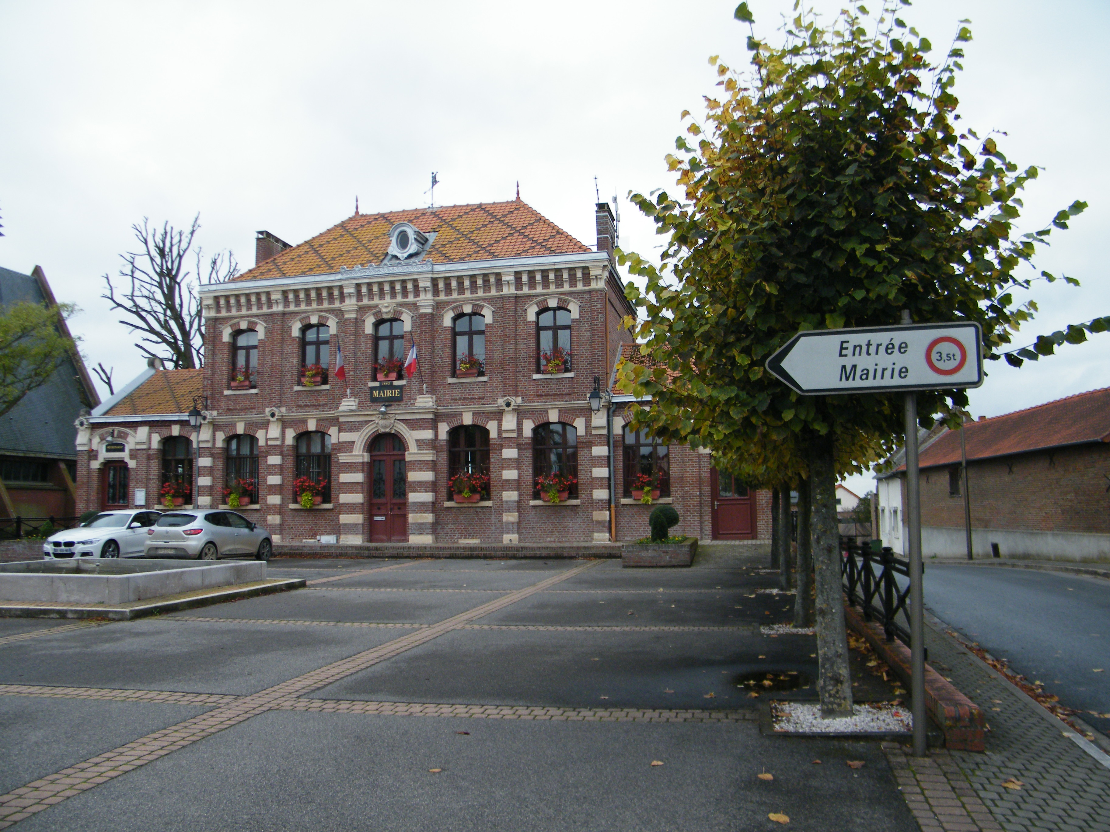 Mairie.